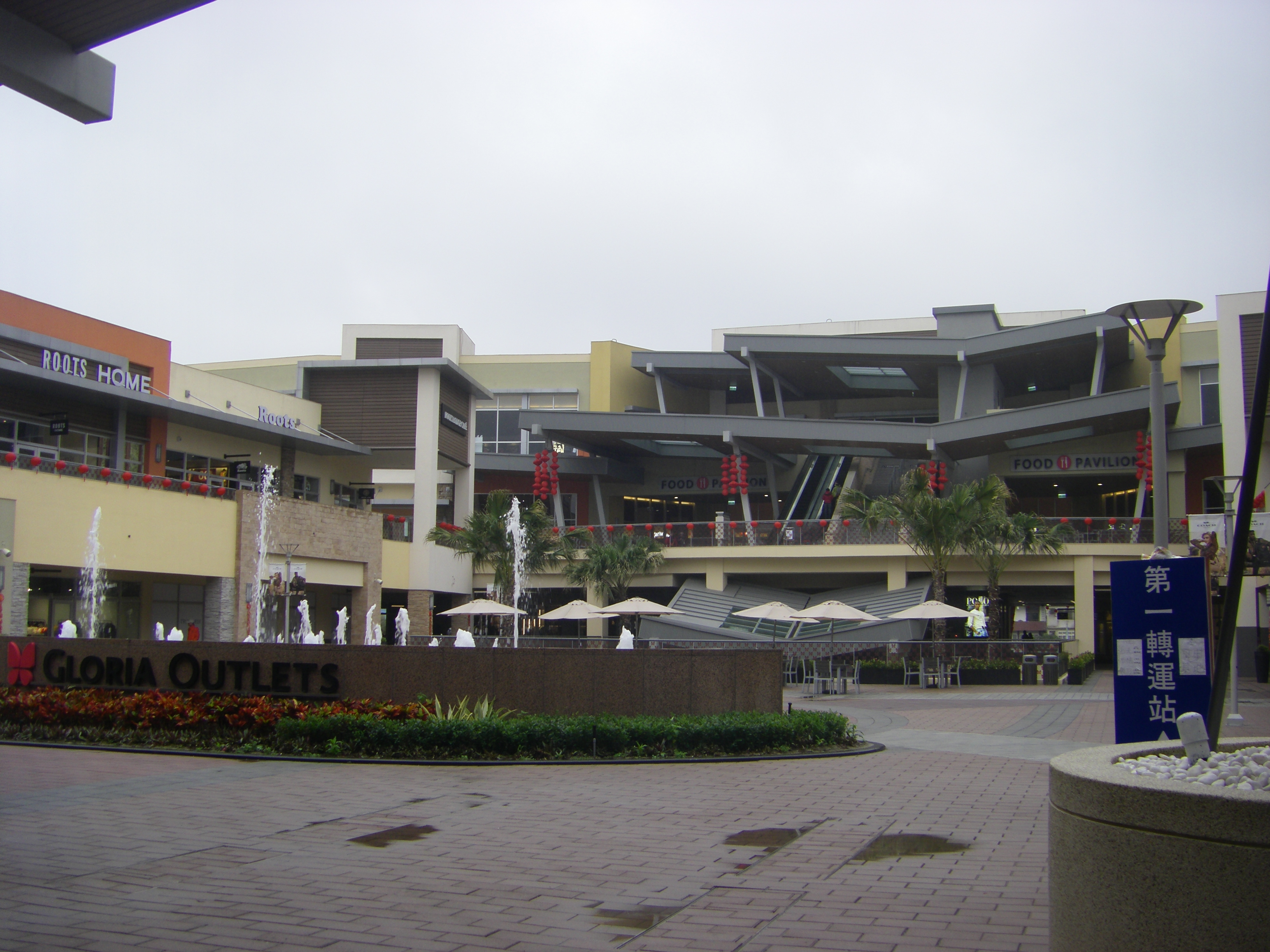 中文（台灣）: 位於桃園市中壢區的華泰名品城